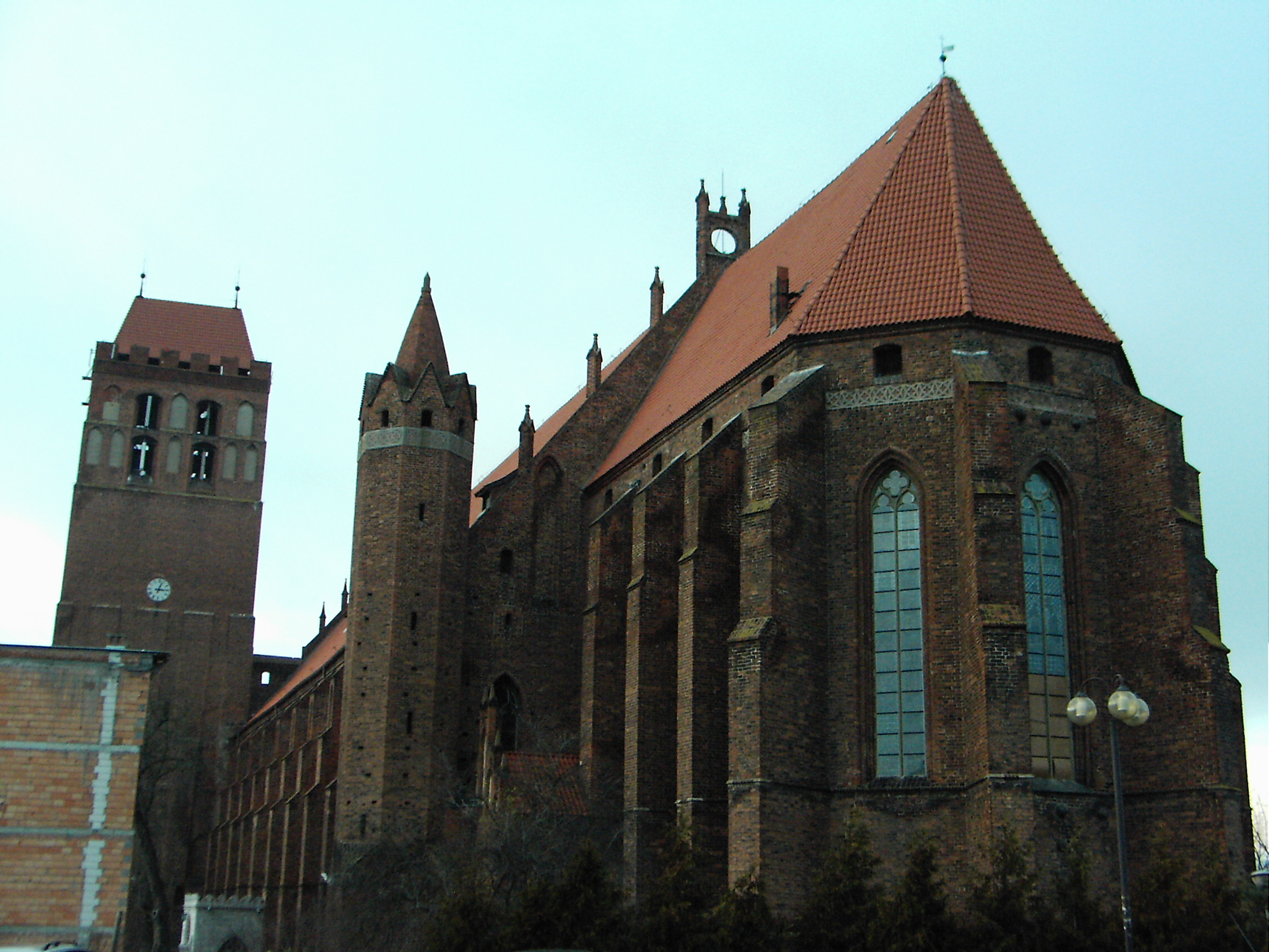 Katedra w Kwidzynie